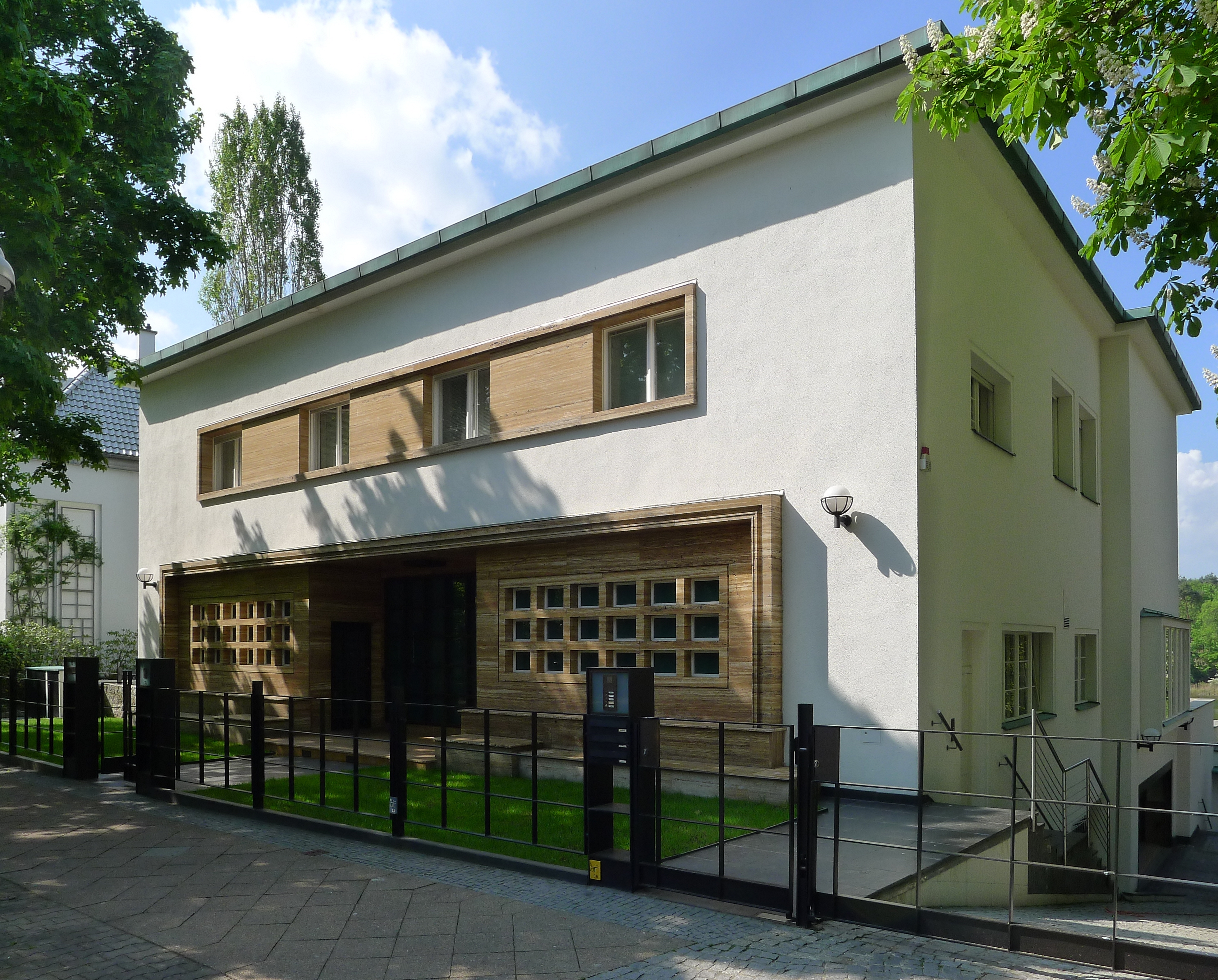 Villa